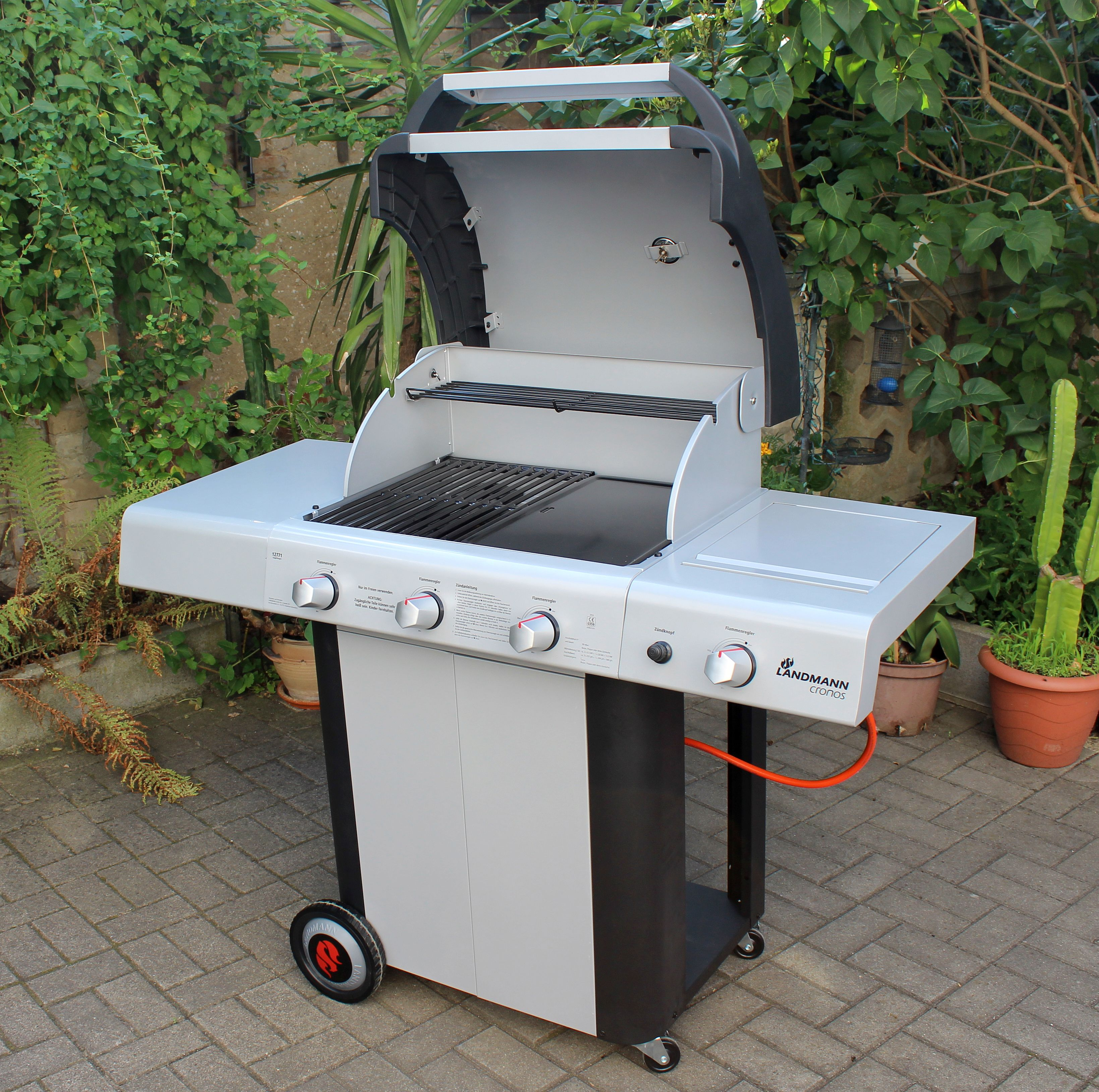 Gasgrillwagen Landmann Cronos 12771